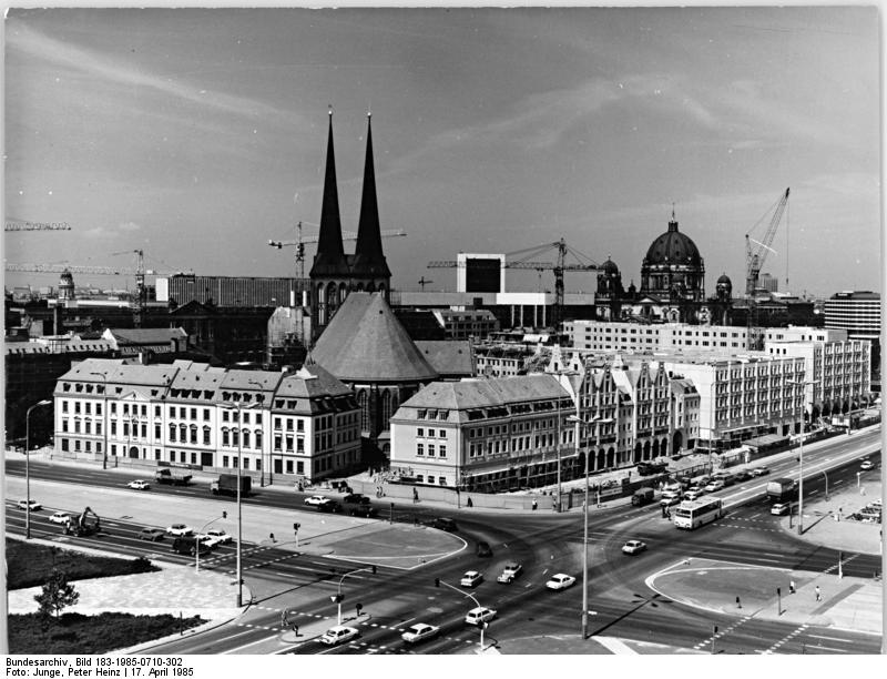 Berlin, Nikolaikirche, Dom, Neubauten ADN-ZB Deutsche Demokratische Republik 17.4.1985 Neubauten auf Urberliner Land (Serie-3 Motive) Auf dem ältesten Siedlungsgebiet Berlins, im Zentrum der Stadt, befindet sich das Nikolaiviertel (Foto). Es wurde im II. Weltkrieg erheblich zerstört. Nach 1945 entstanden neben Wohn- und Geschäftsbauten auch viele der historischen Bauwerke wie die Nikolaikirche (Mitte) wieder in alter Schönheit. Um sie herum gruppieren sich heute am Molkenmarkt neuentstandene bzw. restaurierte Wohn- und Geschäftsbauten. Im Hintergrund (r.) der Dom, links daneben aufragend das Handelshaus am Bahnhof Friedrichstraße. Allein in den letzten fünfzehn Jahren wurden in der Hauptstadt 248.000 Wohnungen neu gebaut oder modernisiert. Im gleichen Zeitraum entstanden u.a. 180 Schulen und 14 Feierabend- und Pflegeheime. Ein amtlicher stenographischer Bericht der Berliner Stadtverordnetenversammlung vom 10.4.1030 weist aus: "...Es ist im Etat kein Pfennig für den Wohnungsbau eingesetzt." Reporter: Junge Copyright: ADN-Zentralbild Berlin-DDR -siehe auch 300 u. 301 N